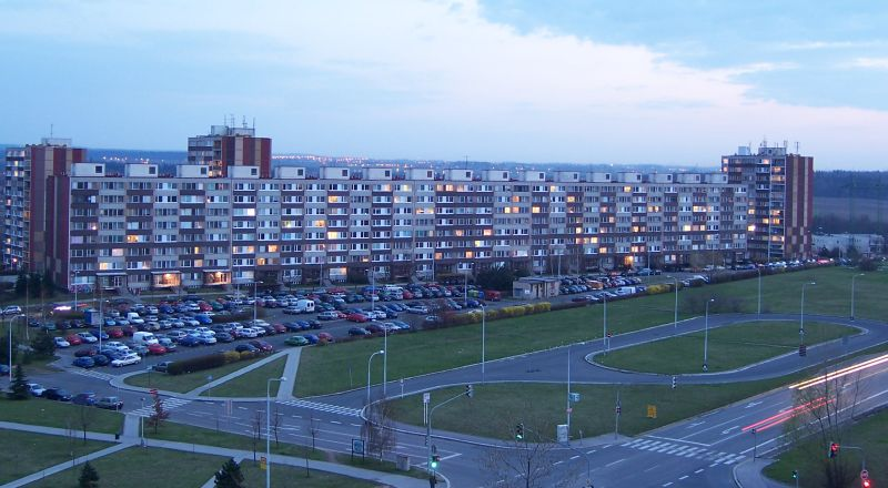 Praha-Petrovice, sídliště Dobrá Voda / Prague-Petrovice, housing estate Dobrá Voda